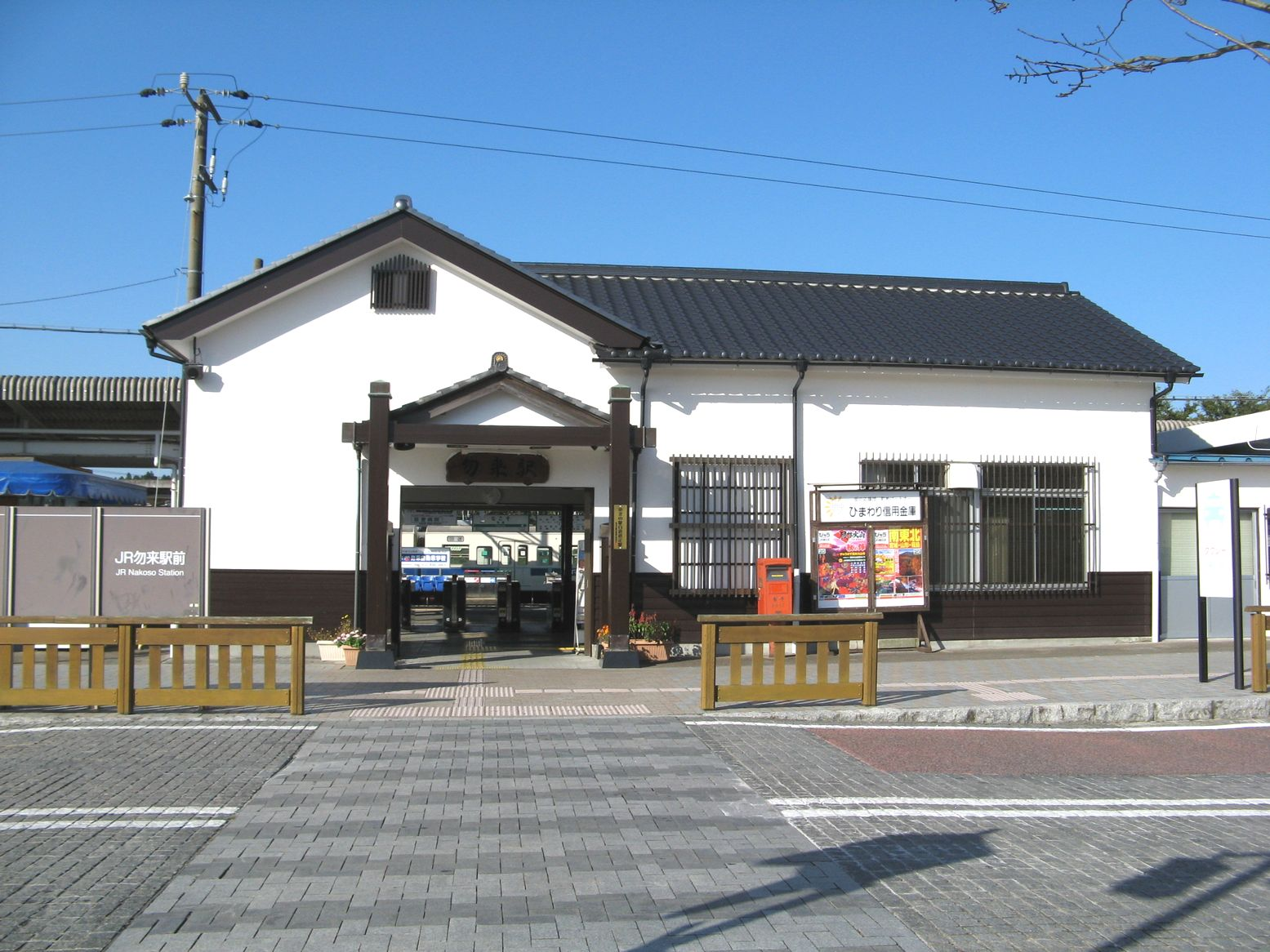 勿来駅